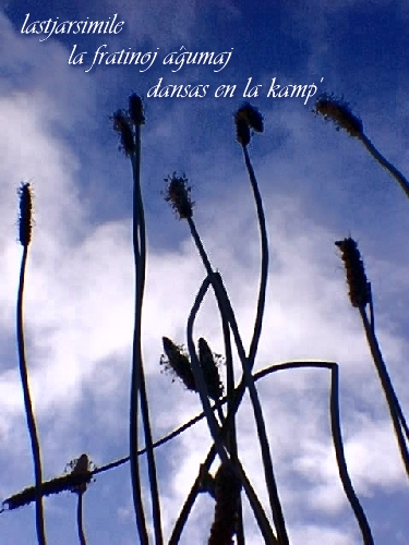 Foto-hajgao de Yumegusa, enhavante la hajkon: "lastjarsimile/ la fratinoj aĝumaj/ dansas en la kamp'". Kreita 2006